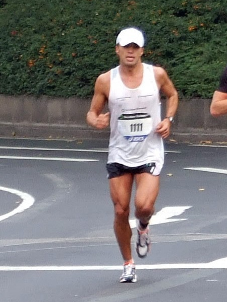 Normann Stadler, beim Frankfurt-Marathon, 2007 in Ffm